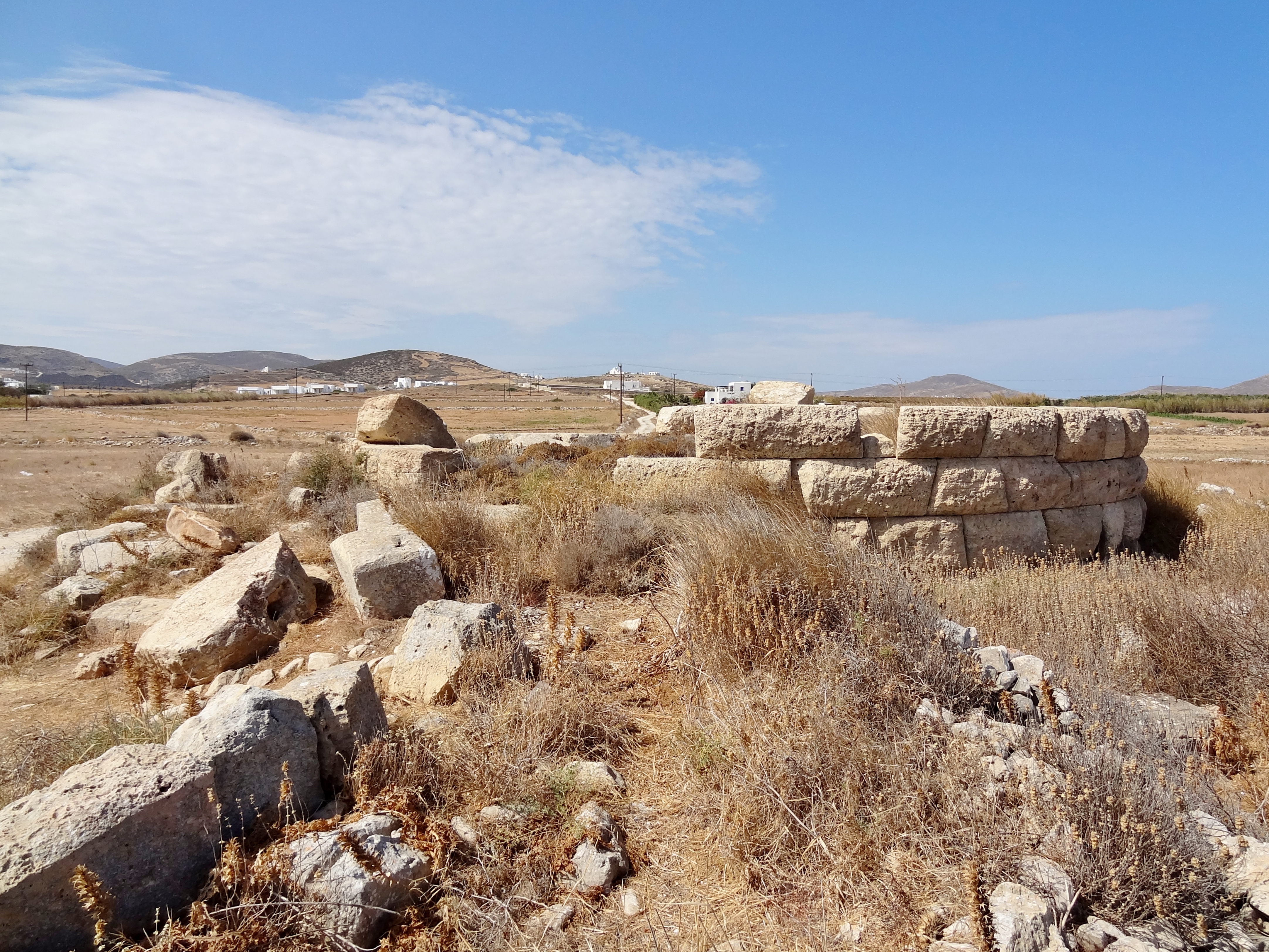 Reste eines Turmes der hellenistischen Epoche bei Naousa auf Paros, Kykladen, Griechenland